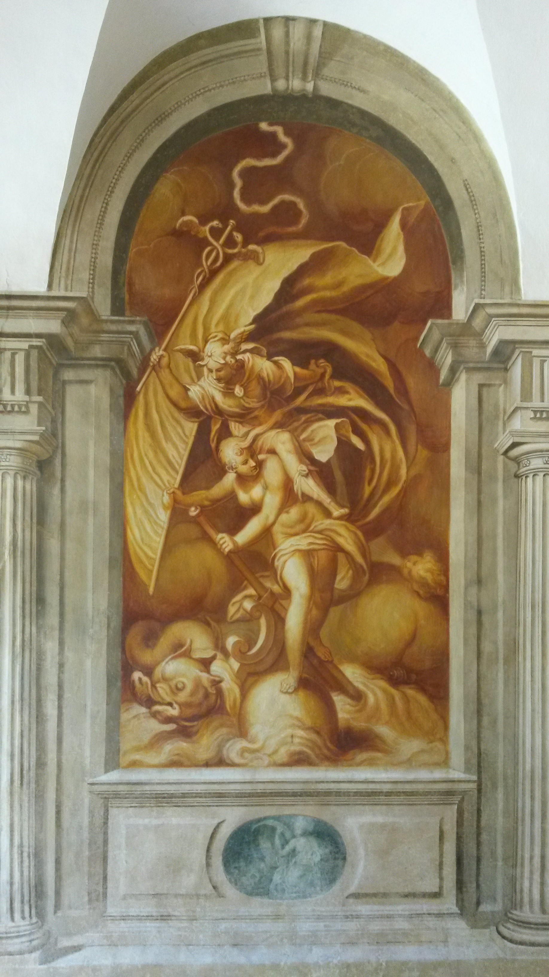 Paolo Farinati, Mercurio guida la Fortuna, 1590 circa, affresco (restaurato nel 2016). Mercurio, dio dell'eloquenza e dell'ingegno, afferra la Fortuna per il lungo ciuffo di capelli e la guida, come il nocchiero di una nave, nel mare tempestoso dell'esistenza.